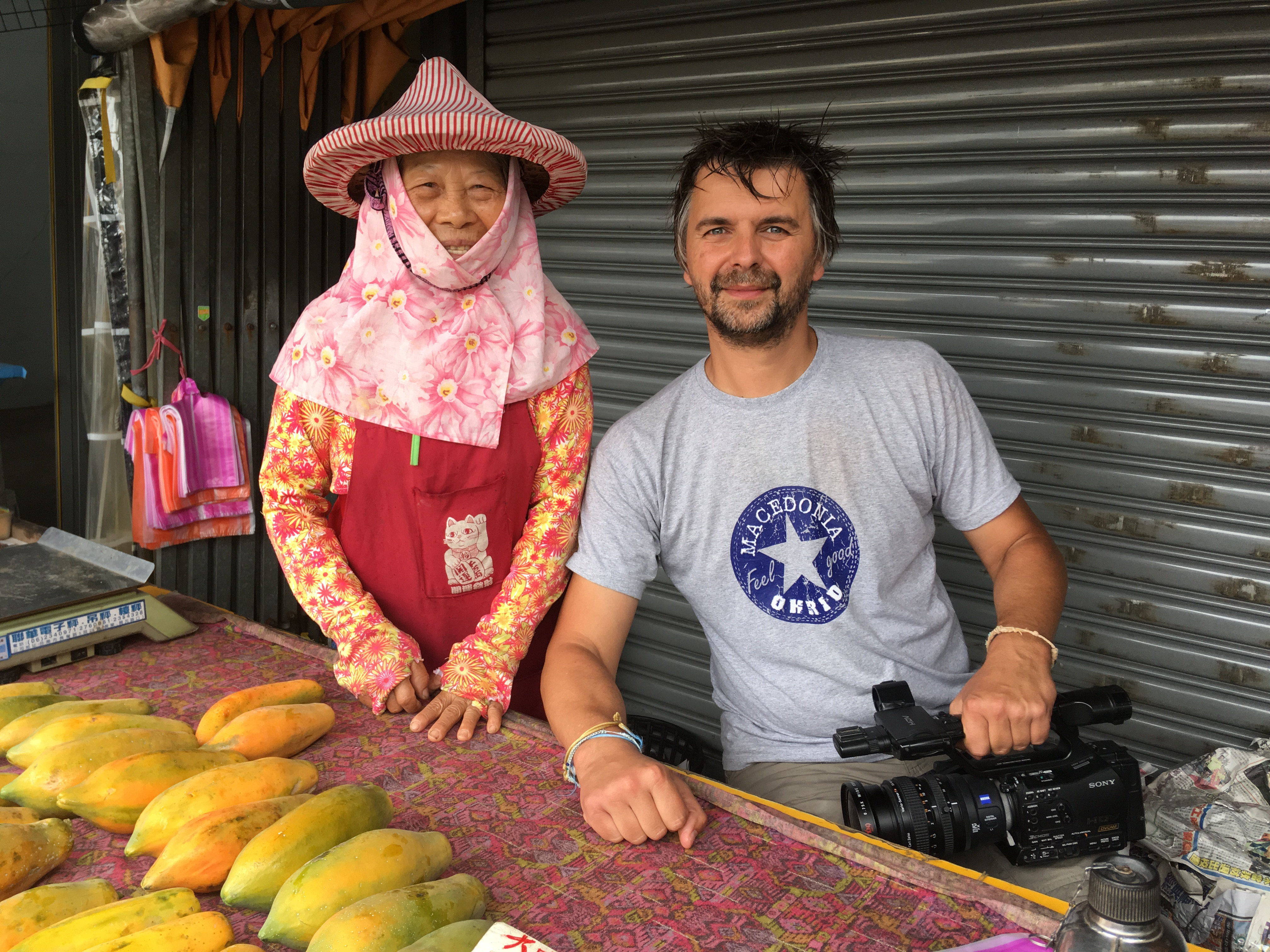 PMDM Taiwan